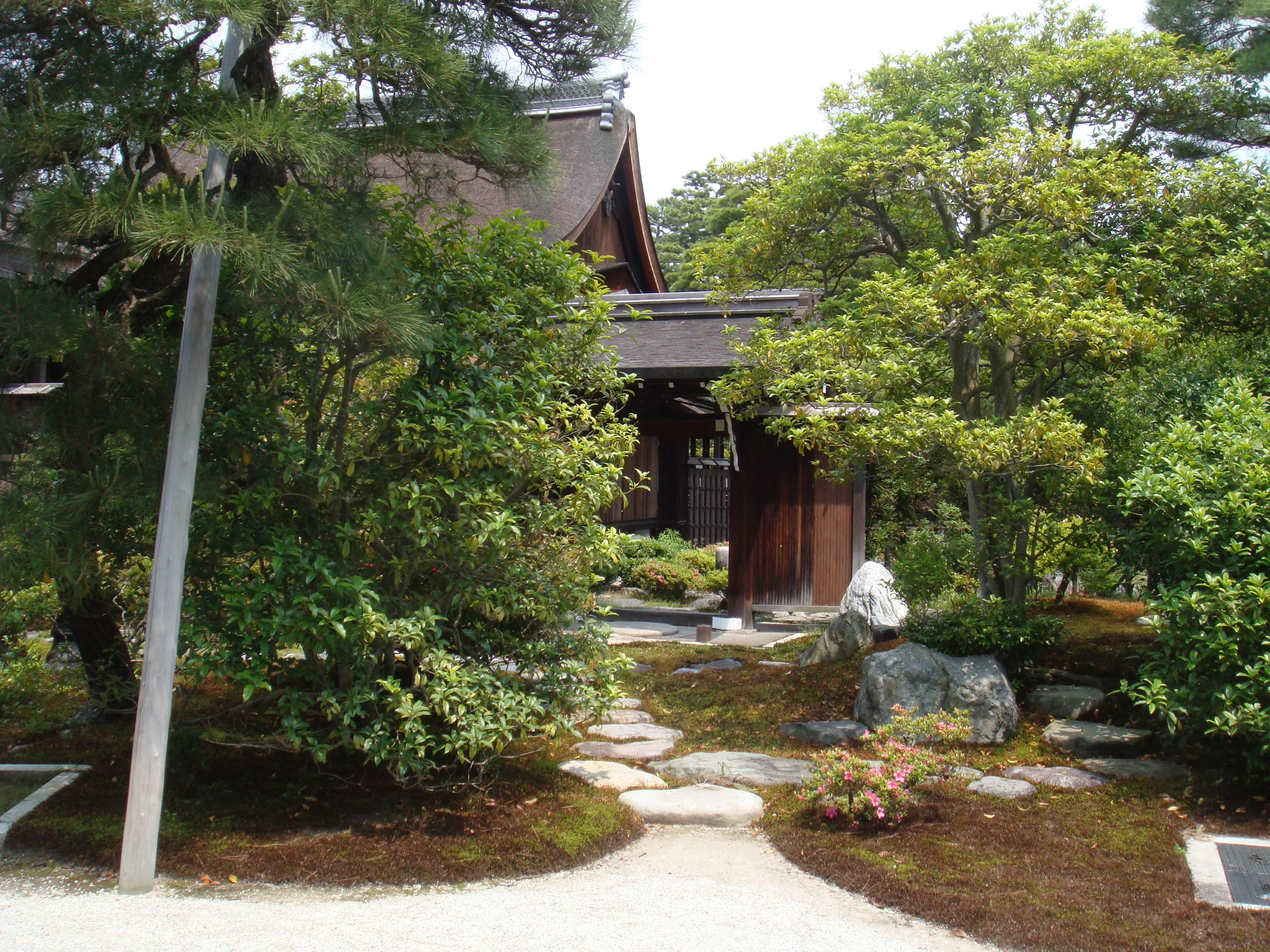 Kyoto